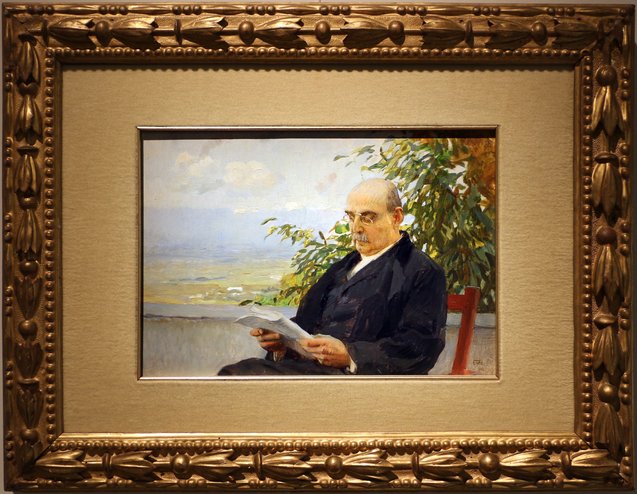 Portrait of Corrado Ricci